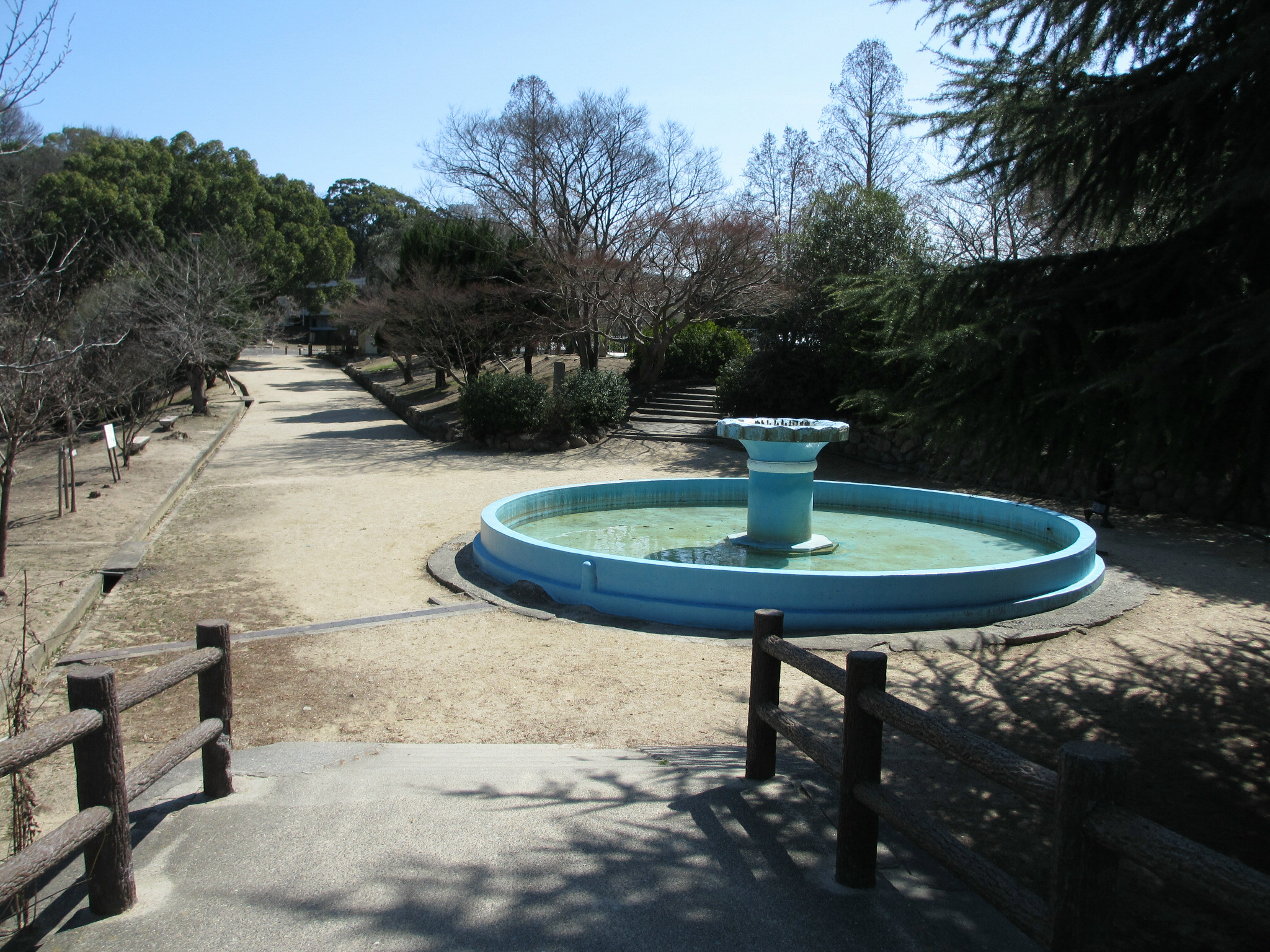 Higashiyama Park